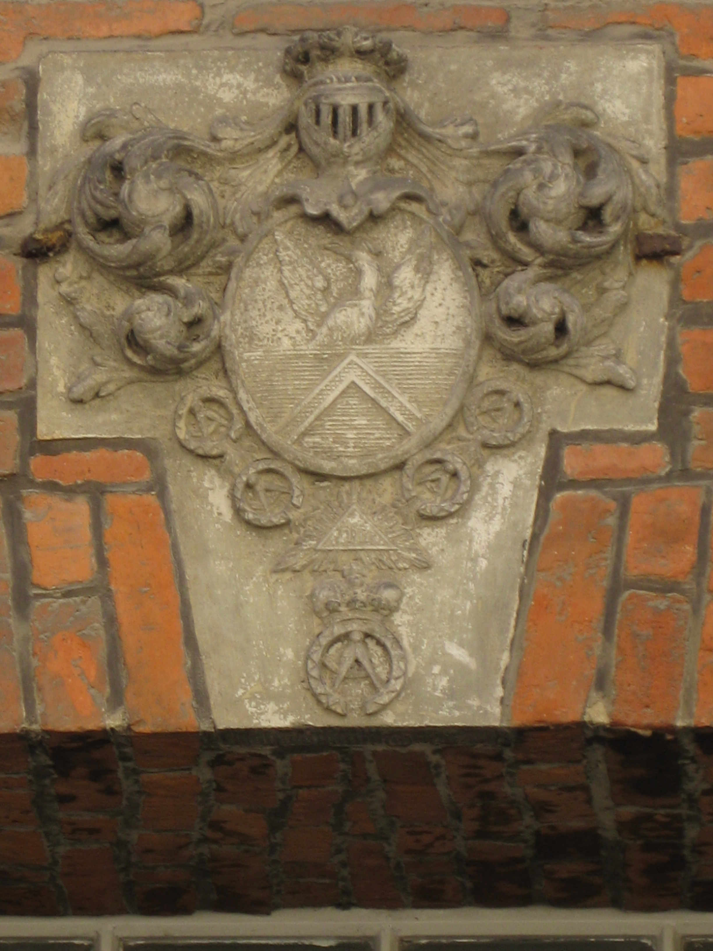 Wappen als Schlußstein an der Glockengießerstraße 8 über dem Eingang zum Wickedestift. Unter dem Wappen das Zeichen der Zirkelgesellschaft